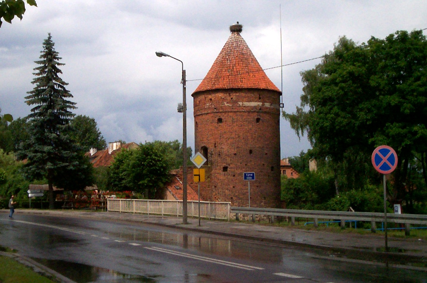 Dobre Miasto, ul. Sowińskiego - Baszta Bociania, XIV-XV